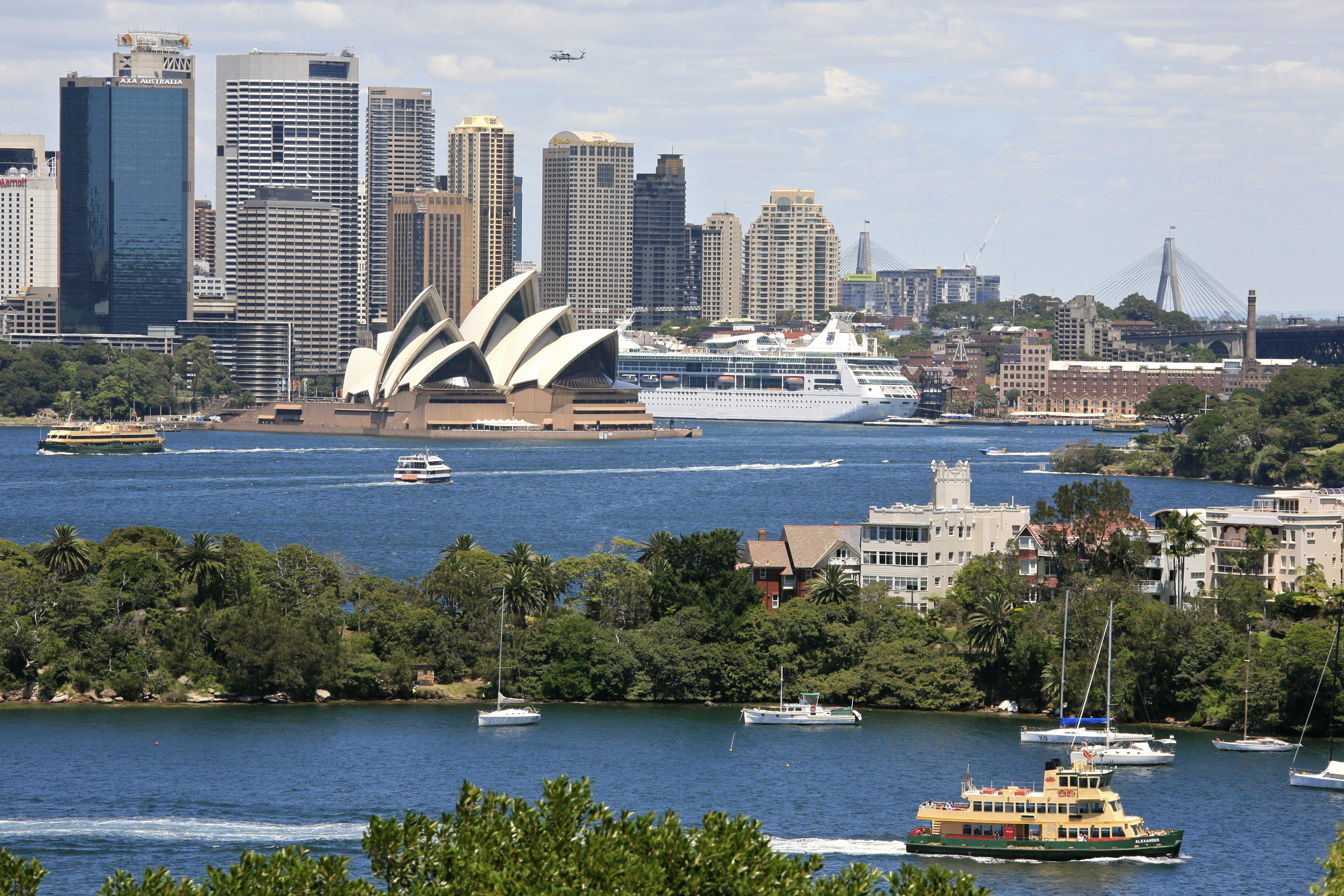 Taken from Taronga Zoo